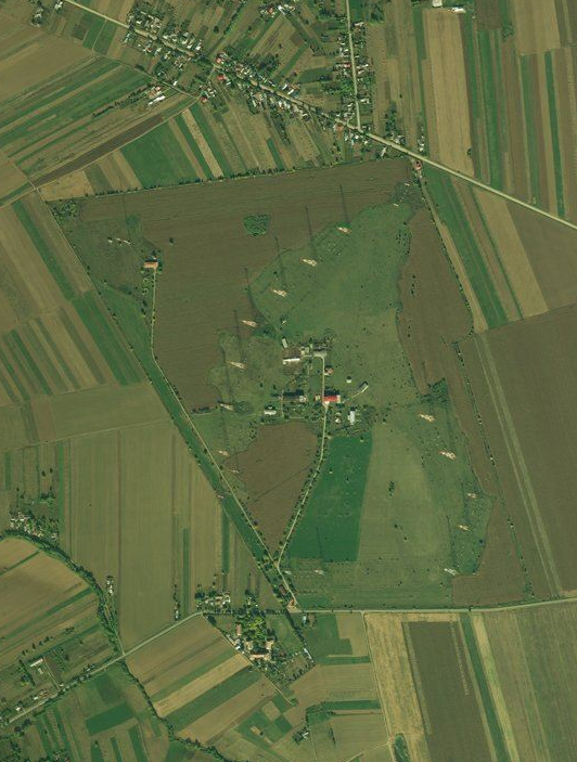 Stația radio Galbeni.